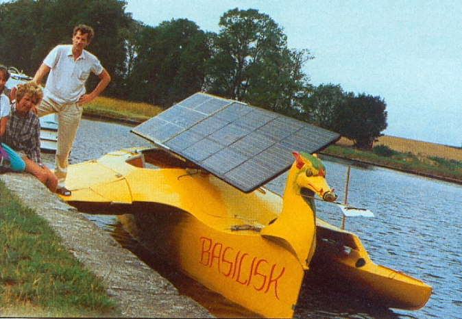 1989 Basel-Koblenz-Saarbrücken-Strasbourg-Basel, designed and built by Matthias Wegmann, Dornach/Switzerland, figurhead by Jürg Eckert, Dornach/Switzerland